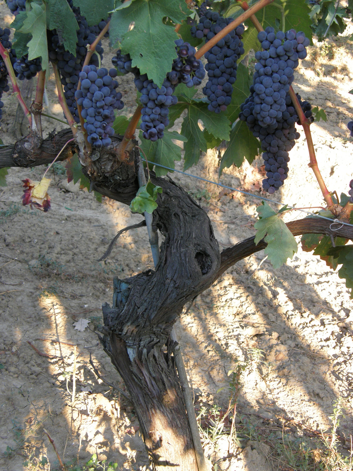 From Azienda Agricola Beconcini Pietro